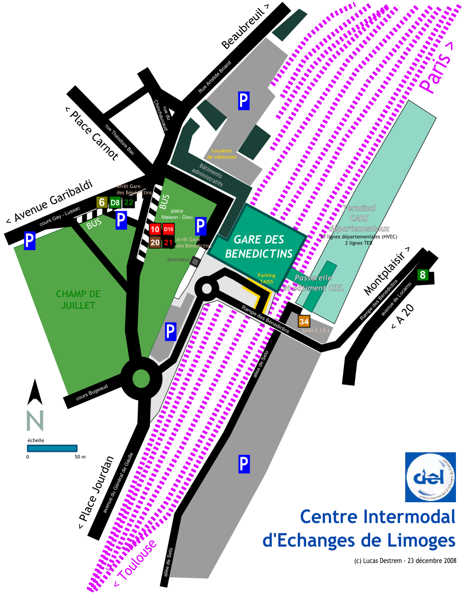 Plan du Centre Intermodal d'Echanges de Limoges (Haute-Vienne, France)